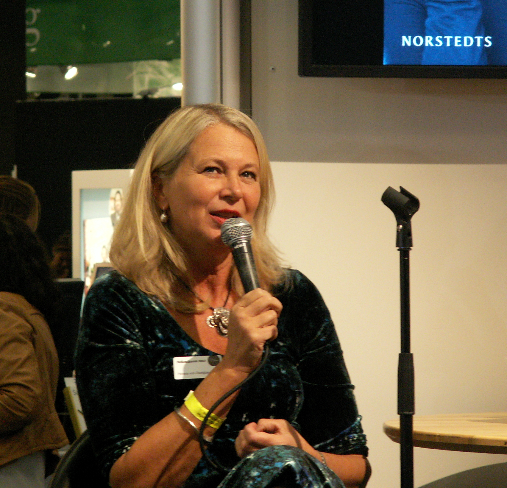 Helena von Zweigbergk på bokmässan i Göteborg, september 2013.